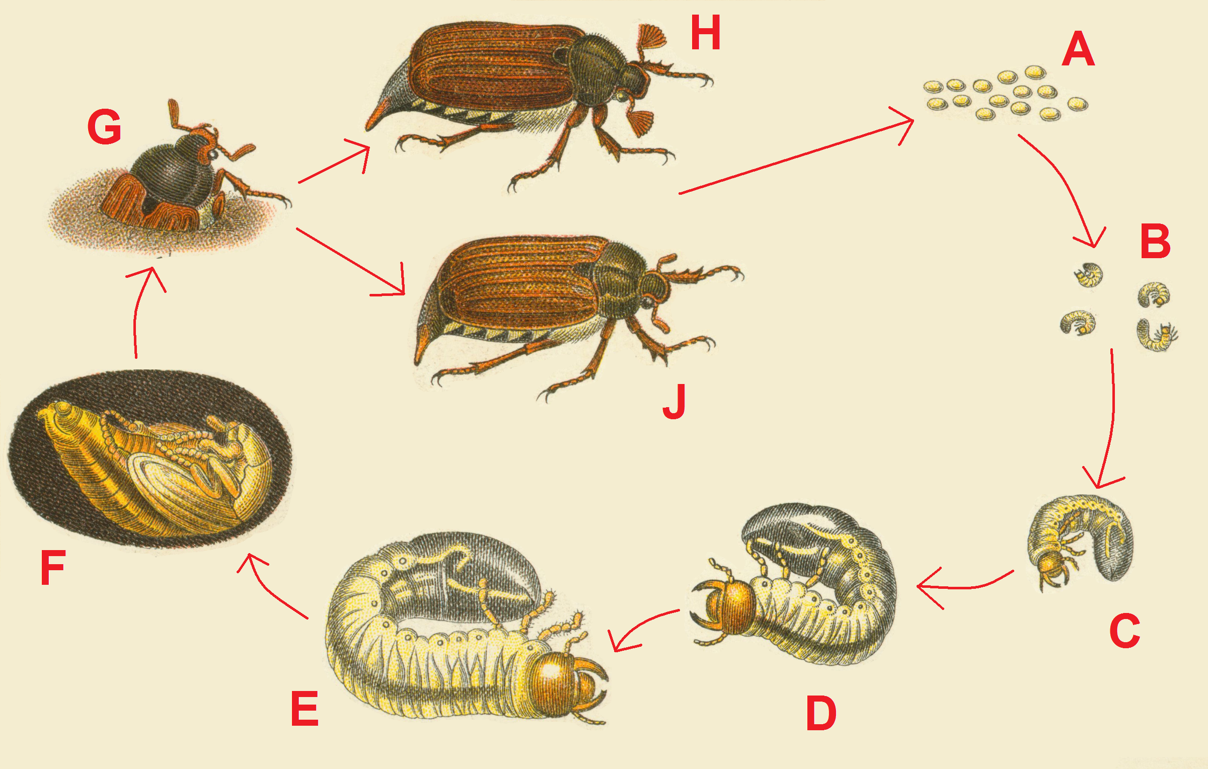 Fauna Germanica. Die Käfer des Deutschen Reiches. I. & II. Band. Farbendrucktafeln von Dr. K.G. Lutz. K.G. Lutz' Verlag, Stuttgart 1908